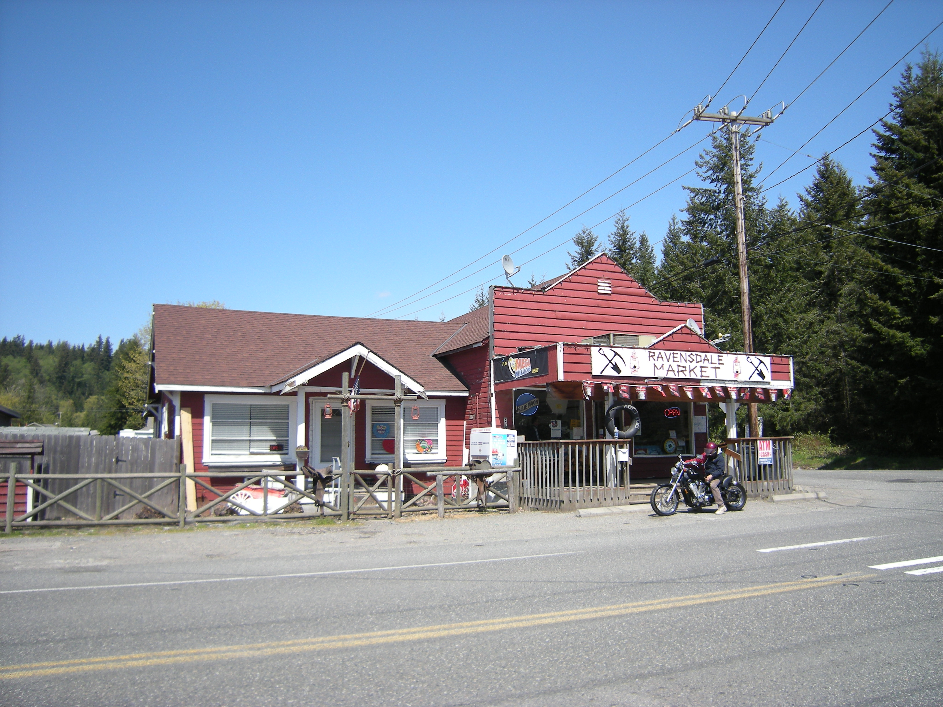 Ravensdale Market, Ravensdale, Washington, USA.